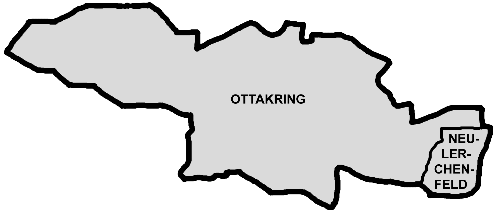 Karte der Bezirksteile von Ottakring in Wien